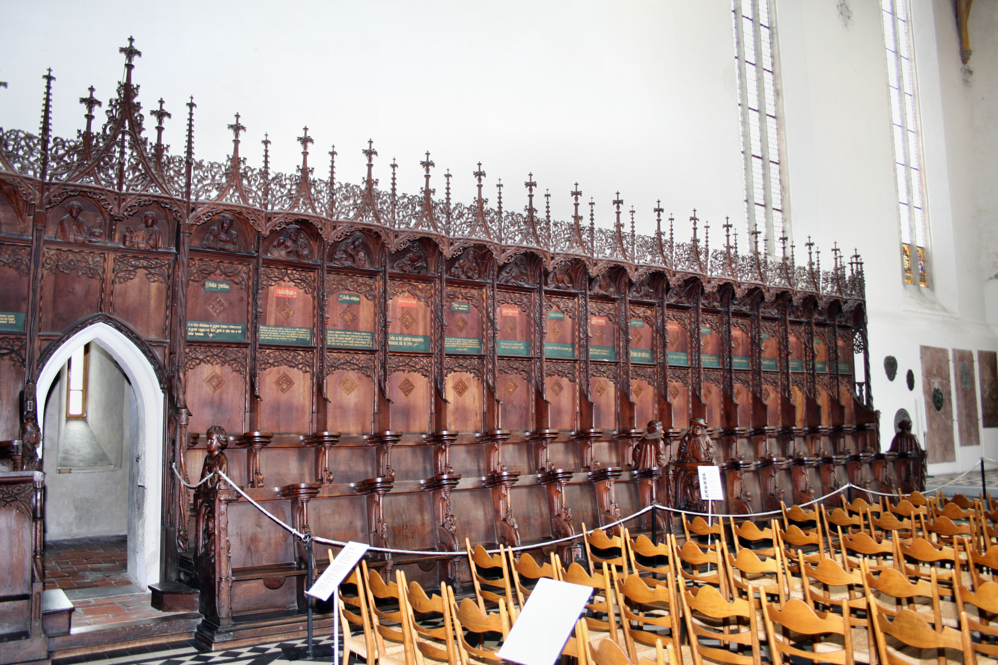 Der nördliche Teil des 1507 fertiggestellten Teils des Chorgestühls.